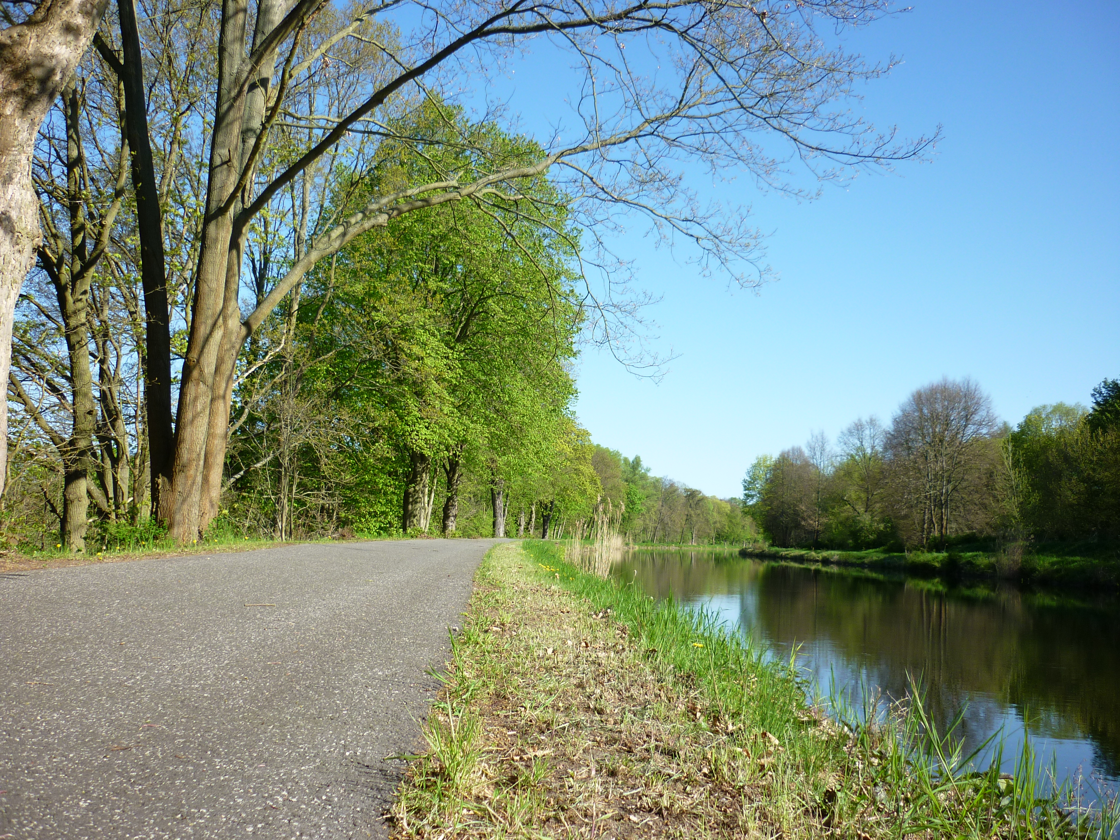 Auf dem Havelradweg zwischen Liebenwalde und Krewelin (Kreis Oberhavel). Links das Naturschutzgebiet "Schnelle Havel", rechts der Voßkanal.